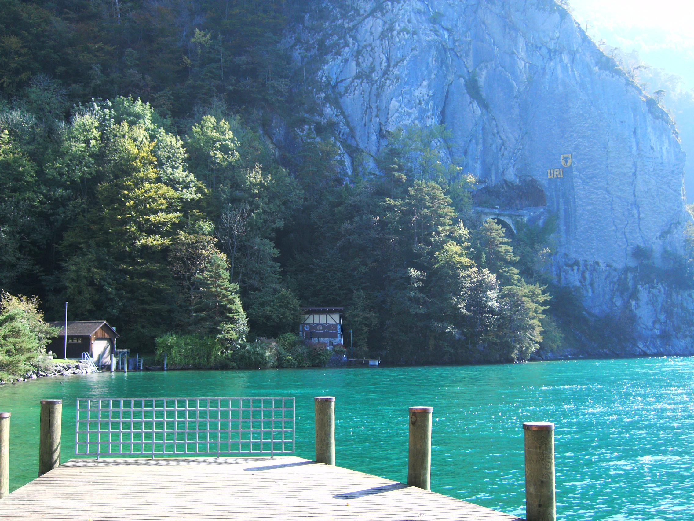 Paysage suisse. Vue du lac des Quatre Cantons et de l'Axenstrasse depuis Sisikon (canton d'Uri).